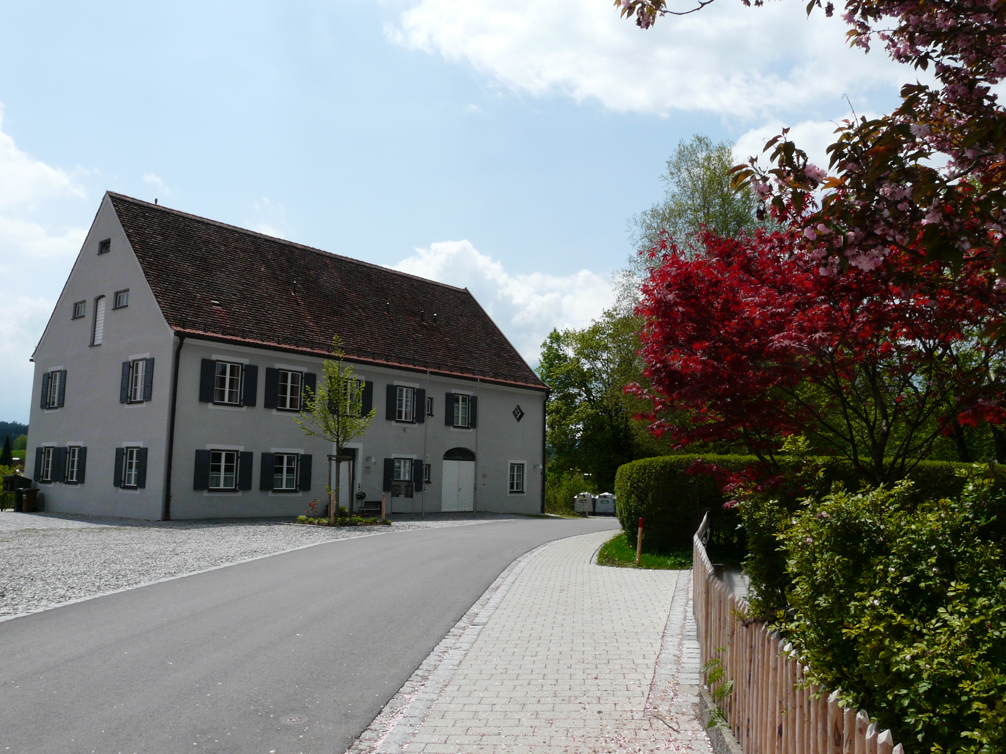 Pfarrhaus in Böbing